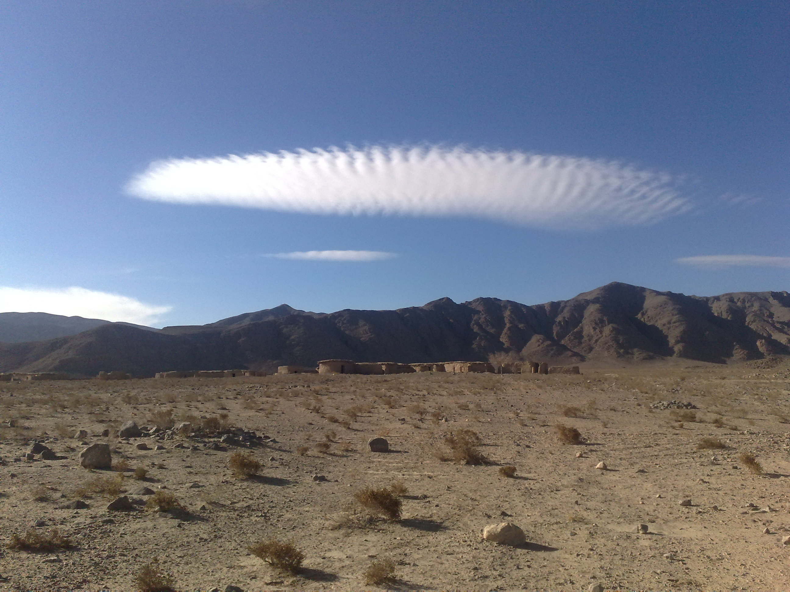 Dasht Quetta